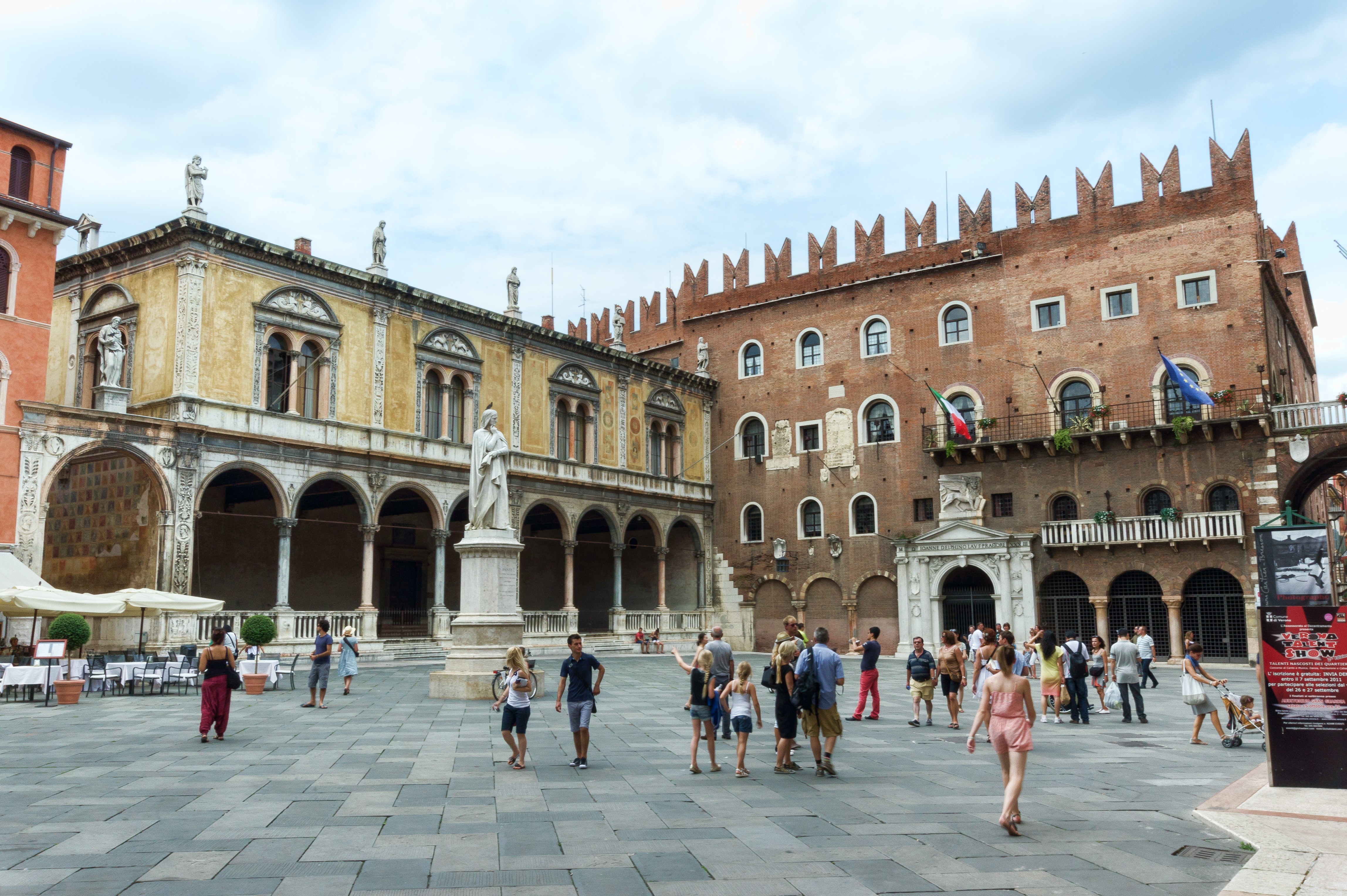 Piazza dei Signori (Vérone)